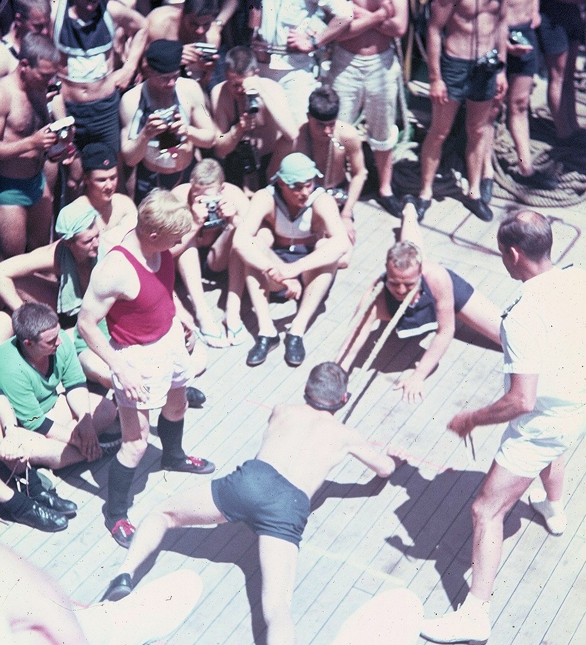 Nackenziehen von Offizieranwärtern auf dem Segelschulschiff Gorch Fock (1958)